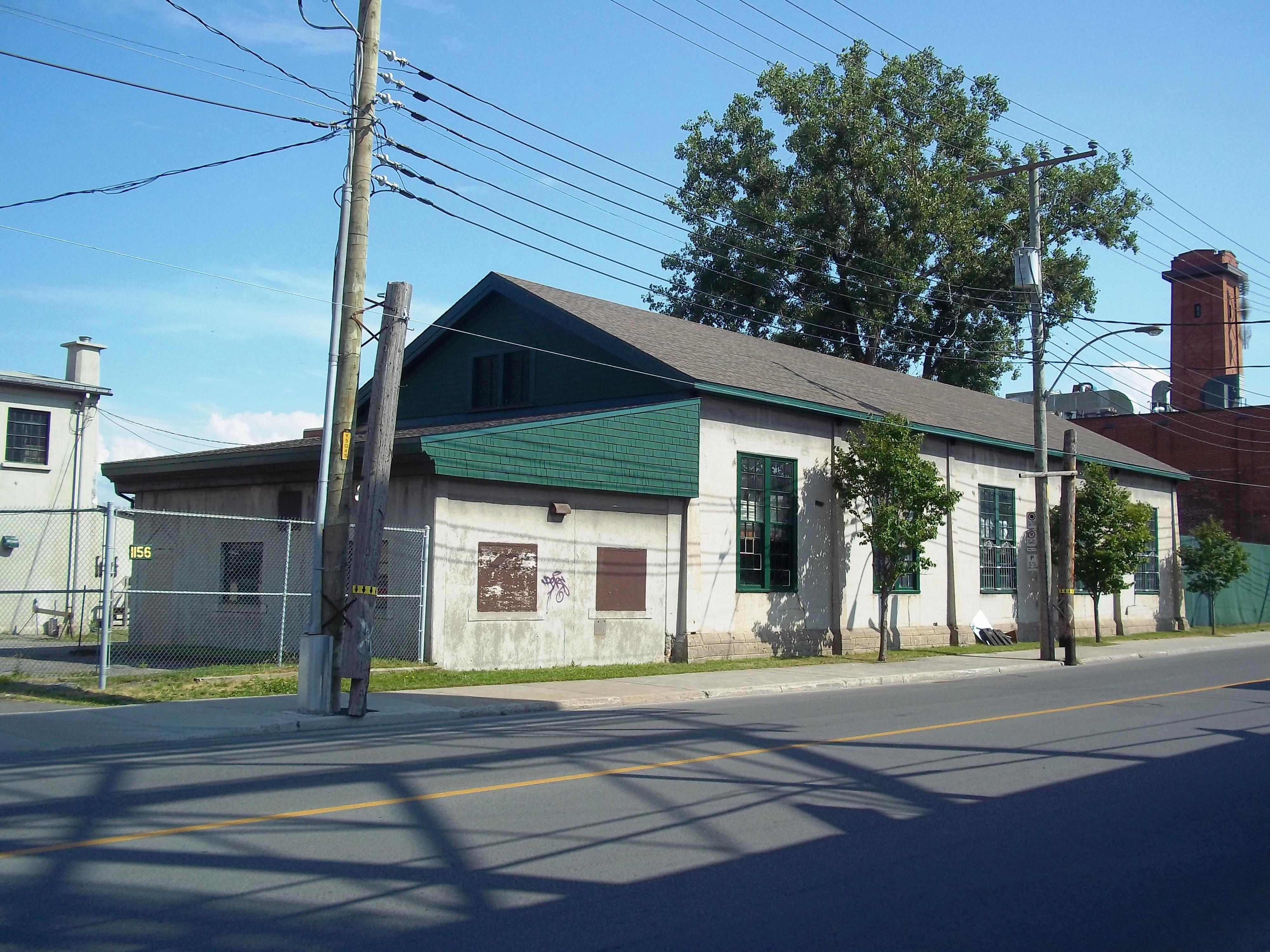 Rue Mill à Montréal : le bâtiment 2, atelier d'usinage.